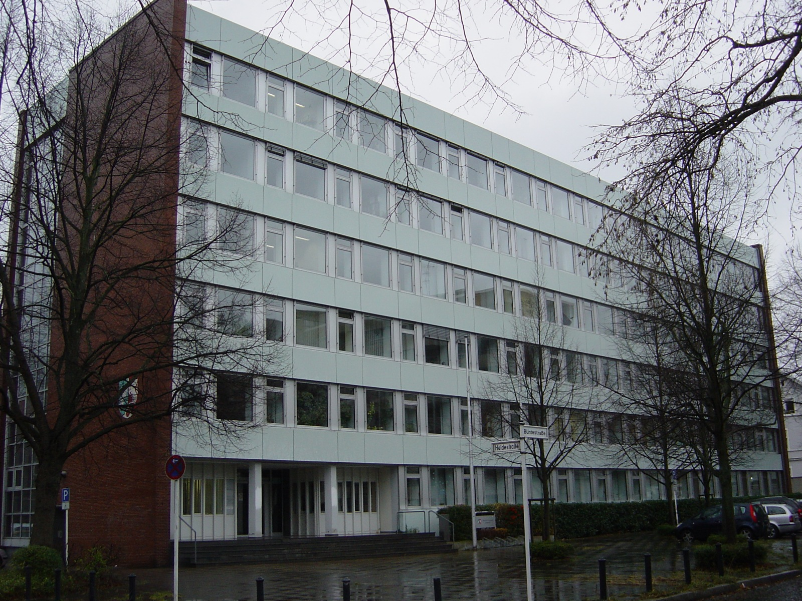 Bezirksregierung Detmold (ehem. Staatliches Umweltamt Minden), Landesamt für Natur, Umwelt und Verbraucherschutz NRW (Dienstgebäude Minden), Büntestr. 1, 32427 Minden